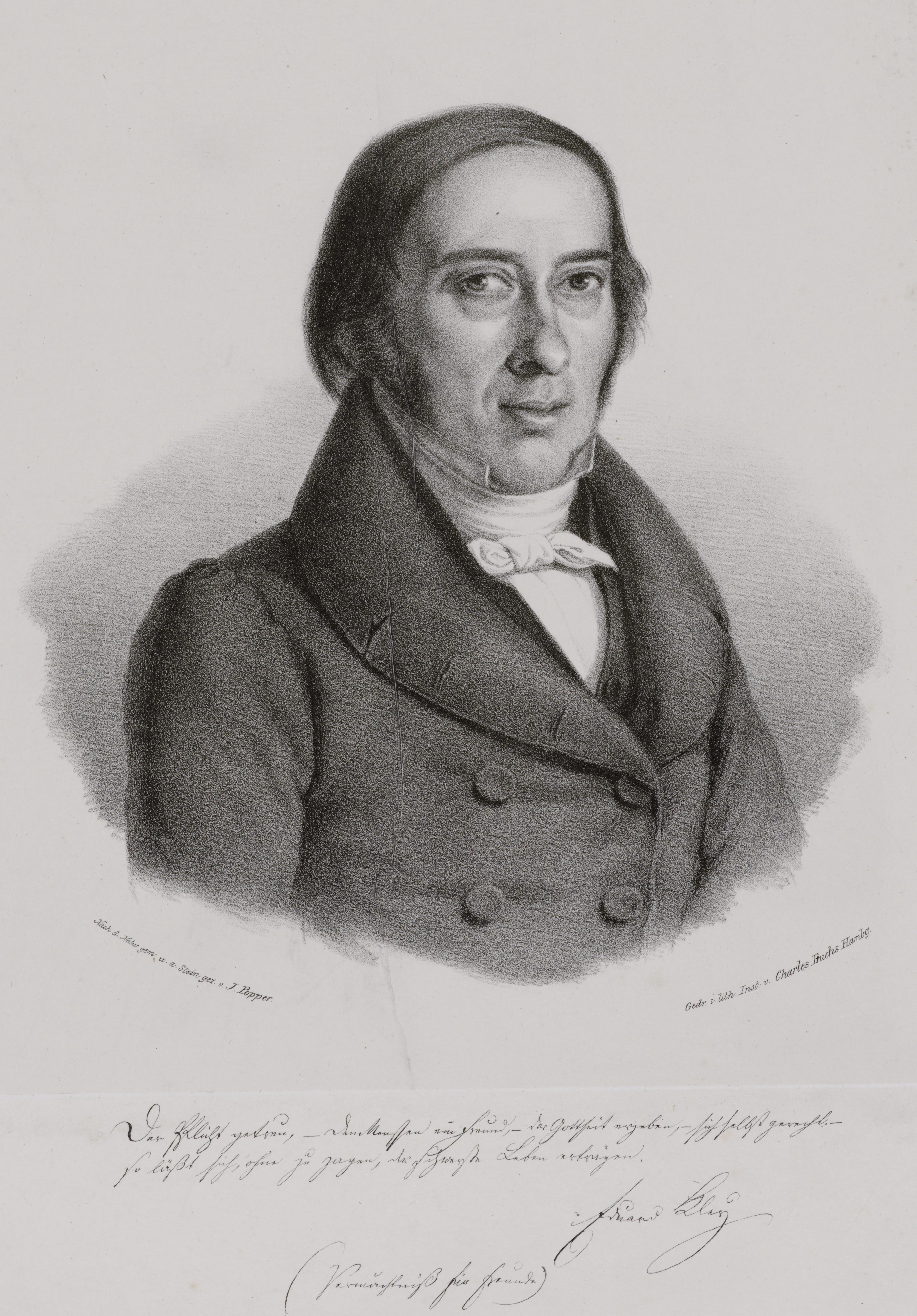 Bildnis von Eduard Israel Kley